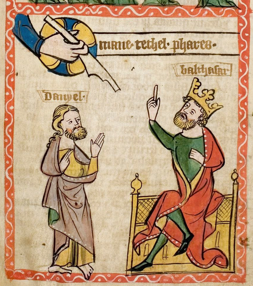 Speculum Humanae Salvationis, Westfalen oder Köln, um 1360. ULB Darmstadt, Hs 2505, fol. 69r; untere Miniatur: Daniel, Belsazar und das "Menetekel"